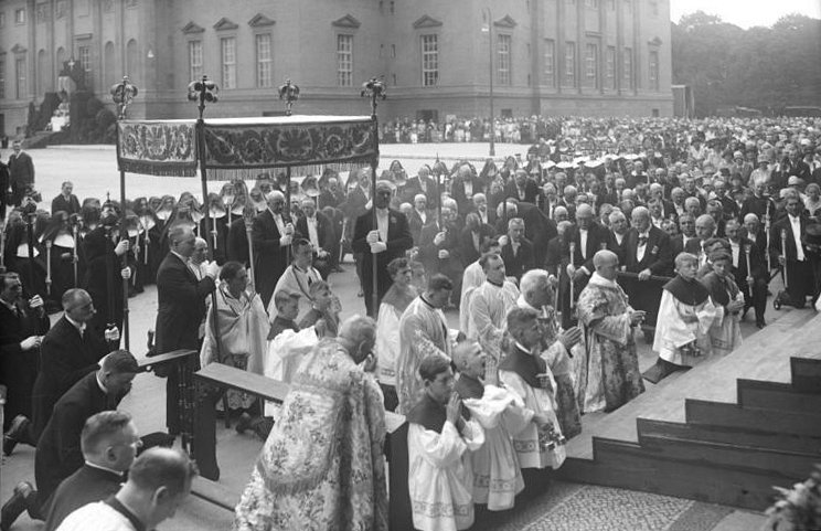 Die feierliche Fronleichnam-Prozession vor der Hedwigskirche in Berlin! Das feierliche Hochamt hielt der Weihbischoff von Berlin Deitmar. Anwesend waren der Reichskanzler Dr. Marx, Reichsfinanzmisister Dr. Köhler und Reichspostminister Schätzel. Blick auf die feierliche Fronleichnam-Prozession vor dem Altar vor der Hedwigskirche in Berlin. Vor dem Baldachin die kirchlichen Würdenträger rechts knieend die Reichsminister Dr. Köhler, Dr. Marx und Schätzel.